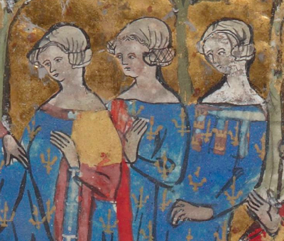 Jeanne de Châtillon et Béatrice de Bourbon et Blanche d'Artois